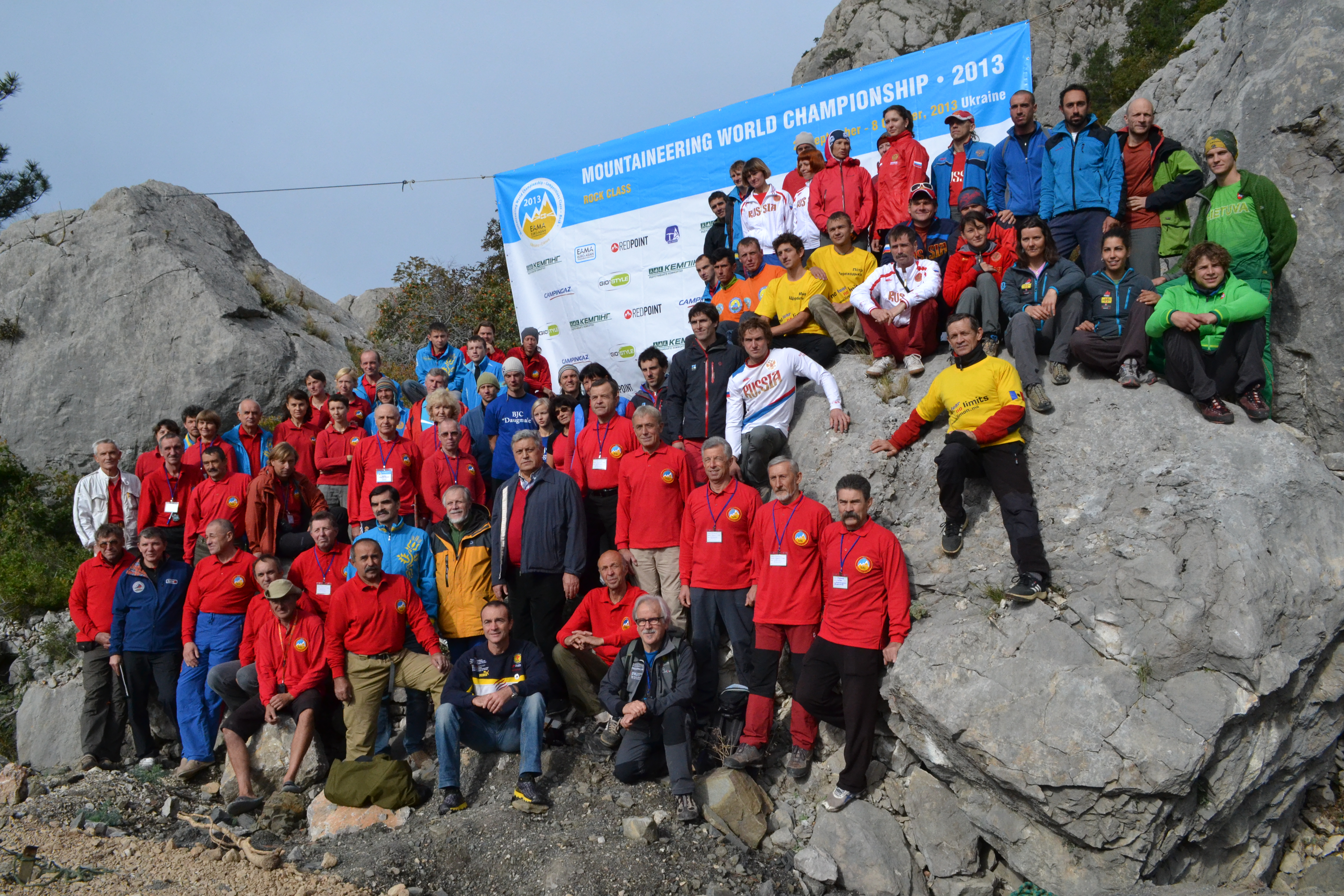 Коллективная фотография участников